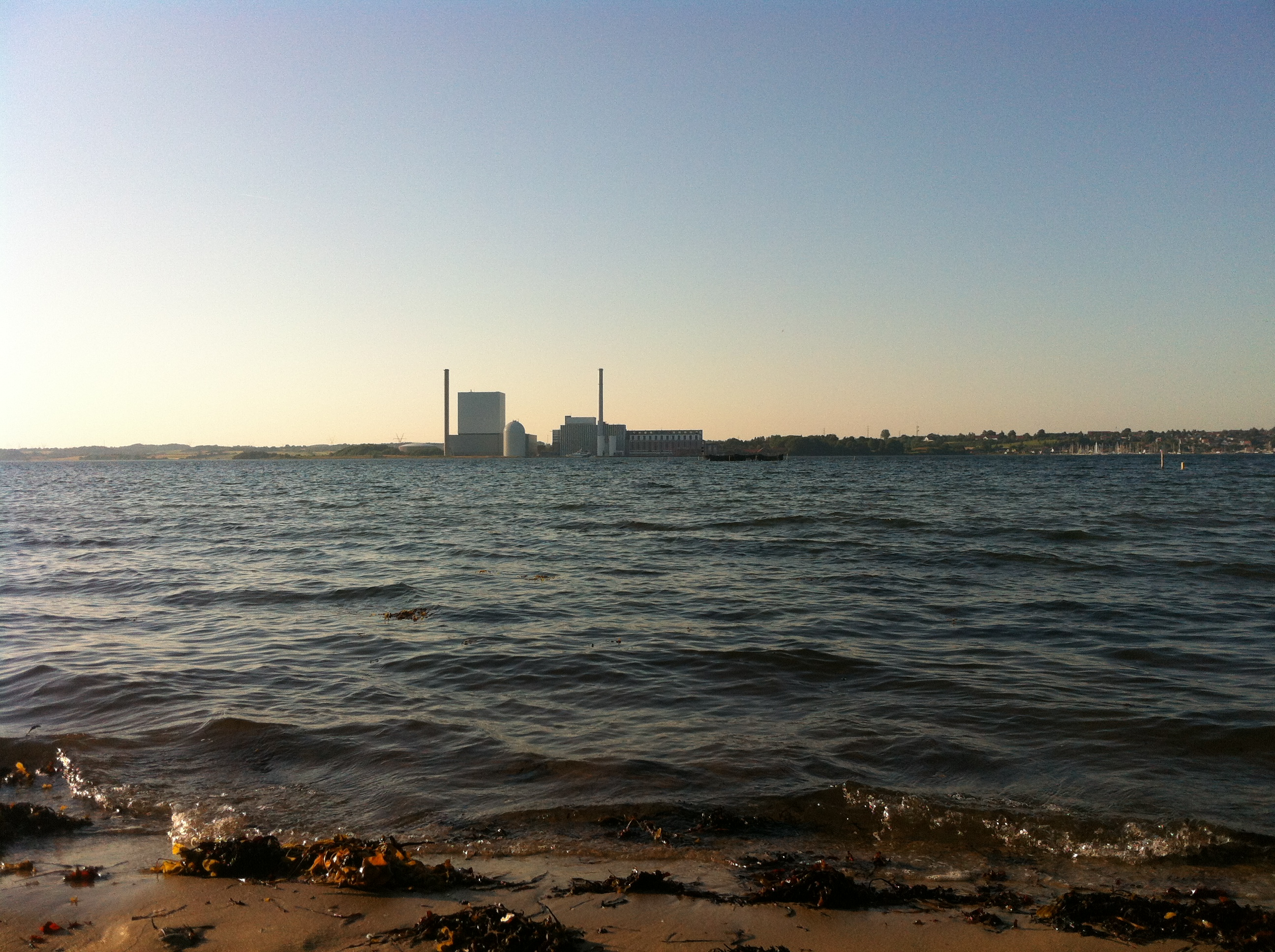 Skærbækværket, juli 2014, set fra Løveode i Sønder Stenderup Skov